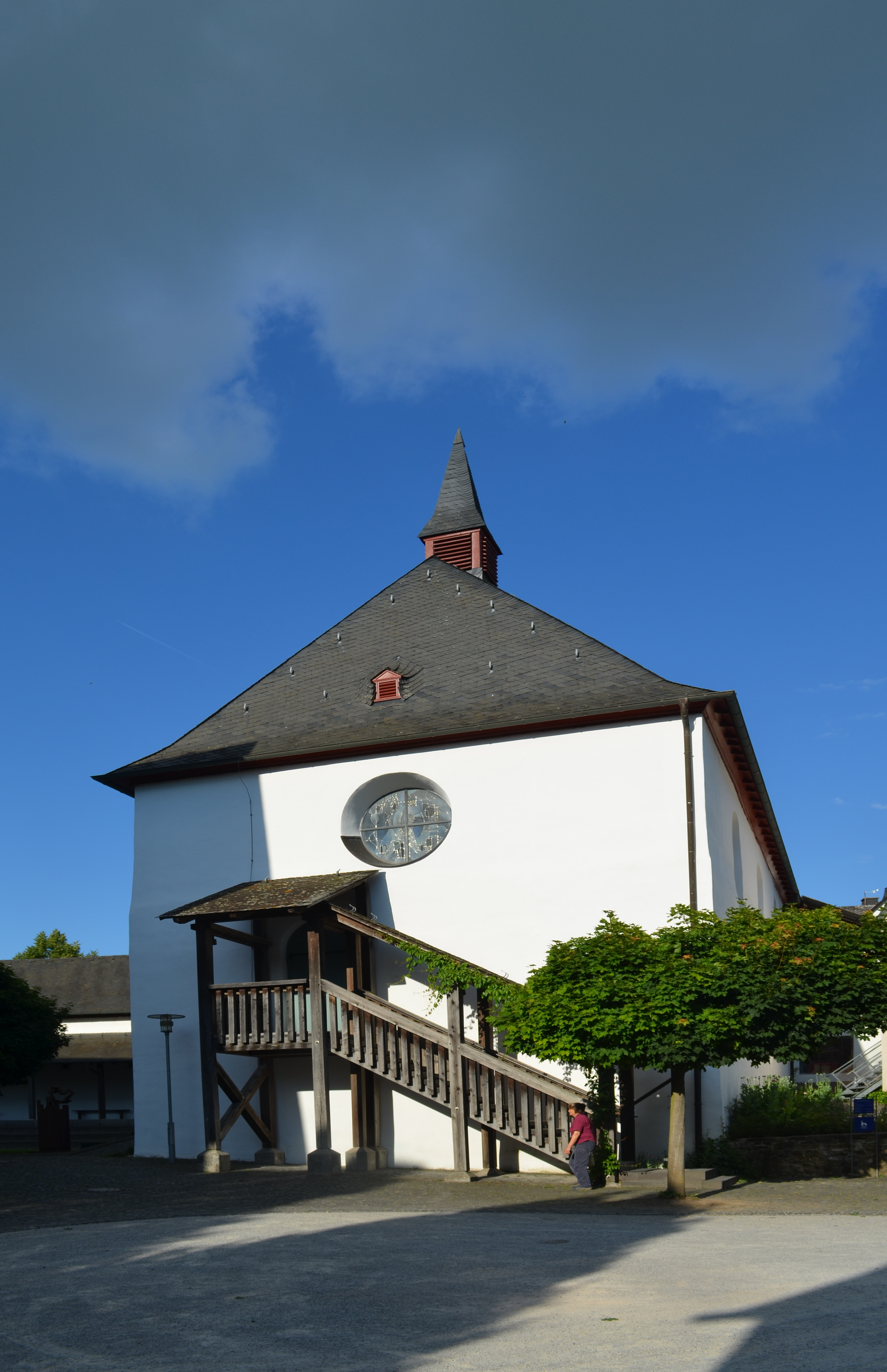 Kloster Gnadenthal, Kirche